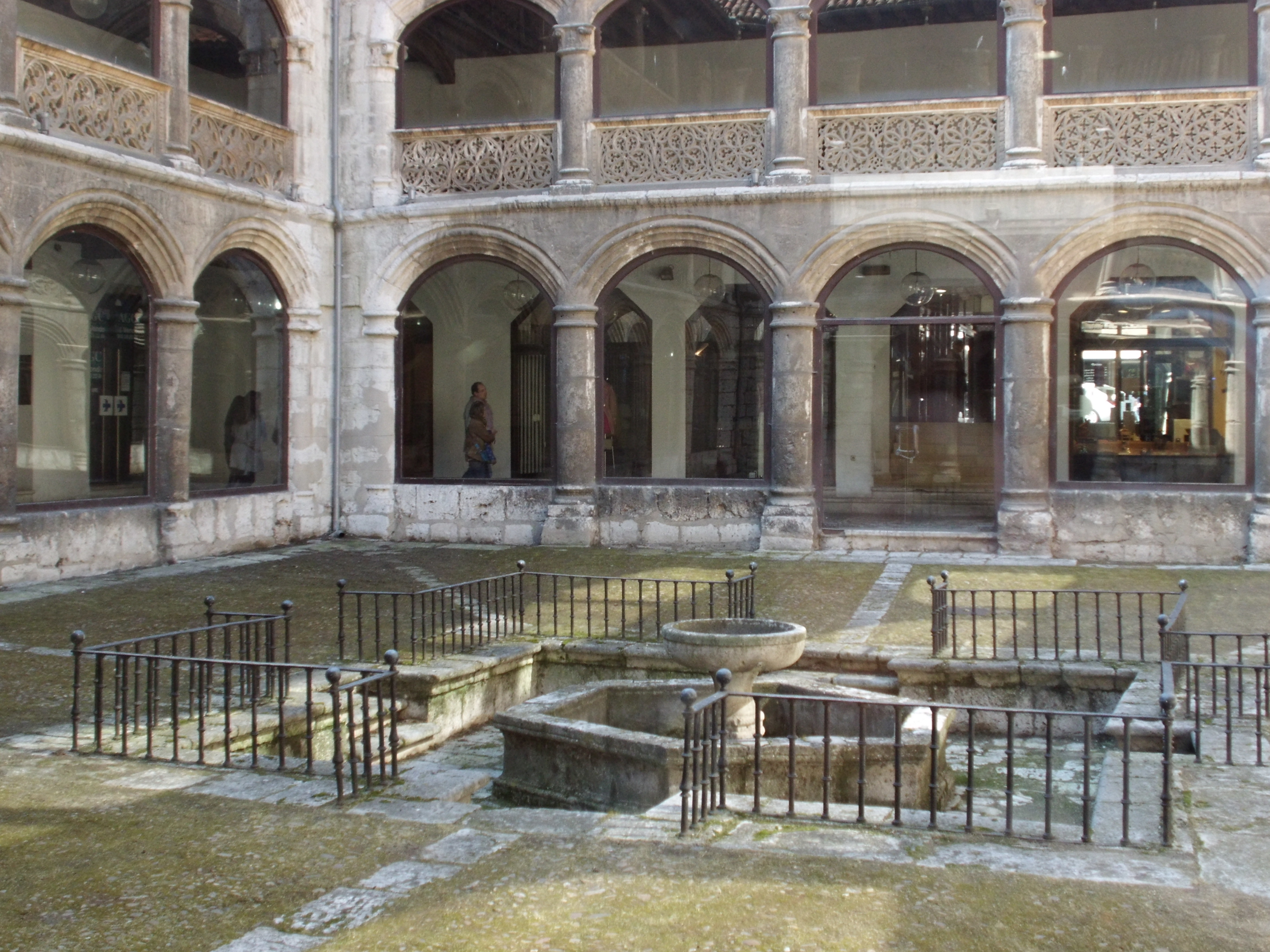 Valladolid (España). Claustro del edificio conocido familiarmente como Las Francesas. En su origen fue el convento de Santa Cruz de comendadoras de Santiago. En 1886 a las monjas dominicas francesas se instalaron en Valladolid y abrieron en el edificio un colegio. El nombre familiar de "Las francesas" se empezó a utilizar a raíz de la existencia del colegio. En el último tercio el siglo XX las monjas se trasladaron a otro lugar después de vender la propiedad. Se construyó un edificio de viviendas y un centro comercial, salvándose la iglesia que el Ayuntamiento utiliza para exposiciones. También se conserva el claustro conocido vulgarmente como patio de las tabas por adornarse el pavimento con tabas y guijarros de río. También se conserva en el interior la escalera monacal.